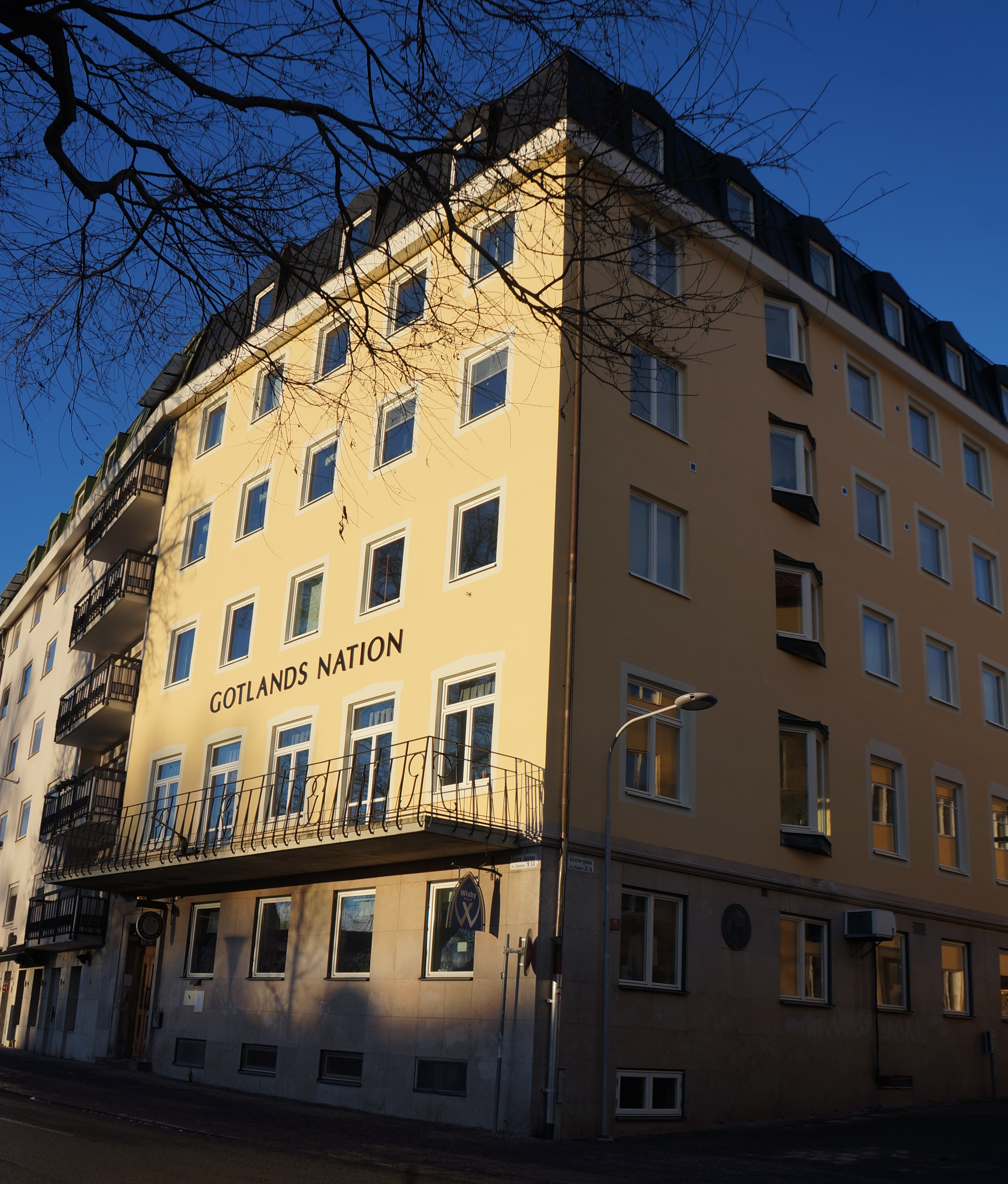 Gotlands nation 2013, dvs efter fasadrenoveringen 2012.